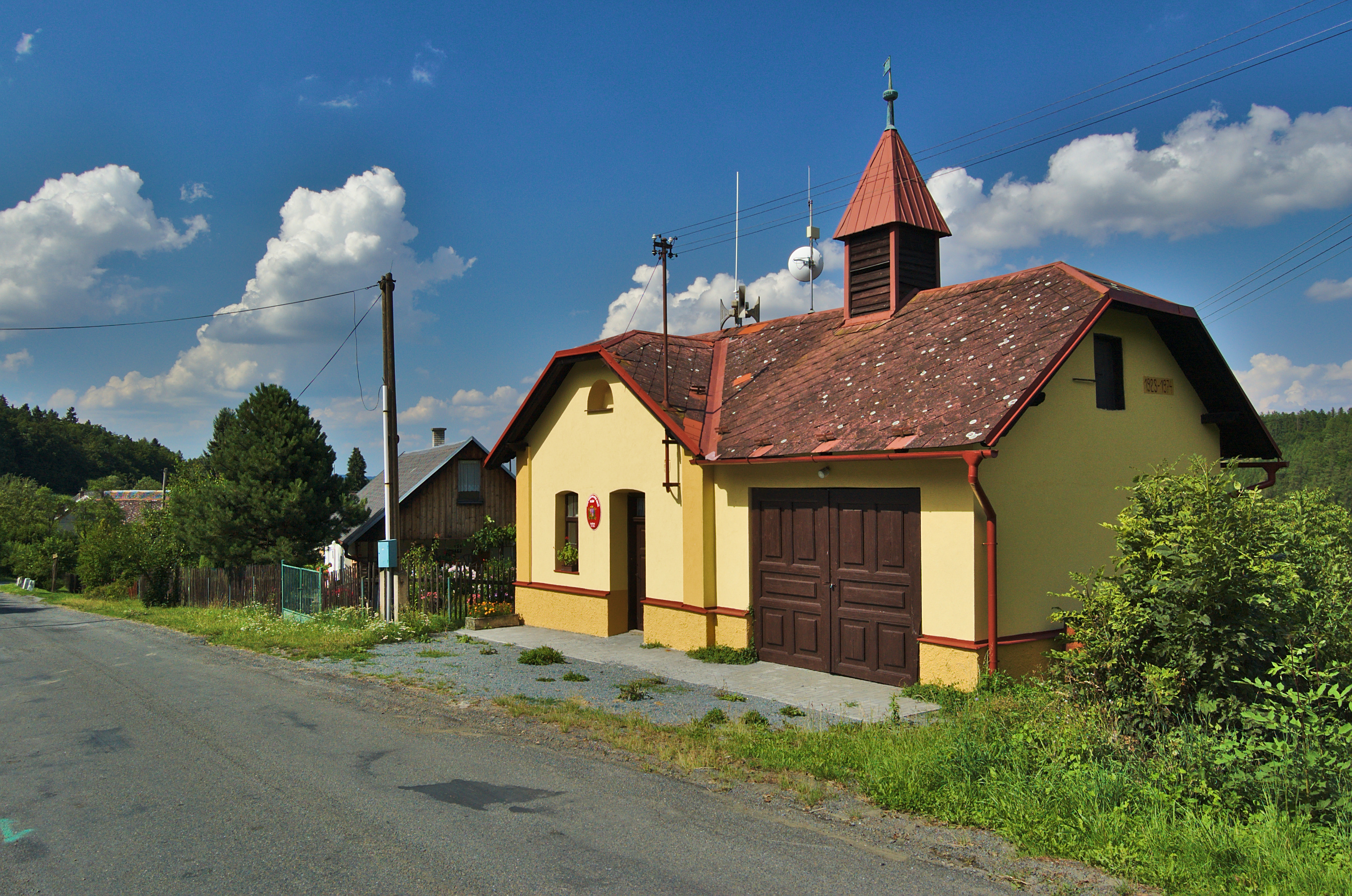 Hasičská zbrojnice, Kadeřín, Bouzov, okres Olomouc